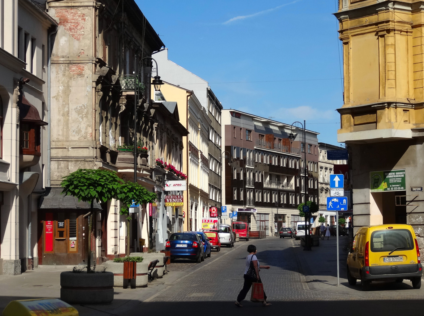 Ulica Dworcowa w Bydgoszczy na odcinku od ul. Gdańskiej do ul. Warmińskiego